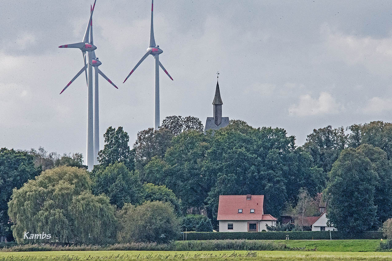 Kambs in der Mecklenburger Seenplatte